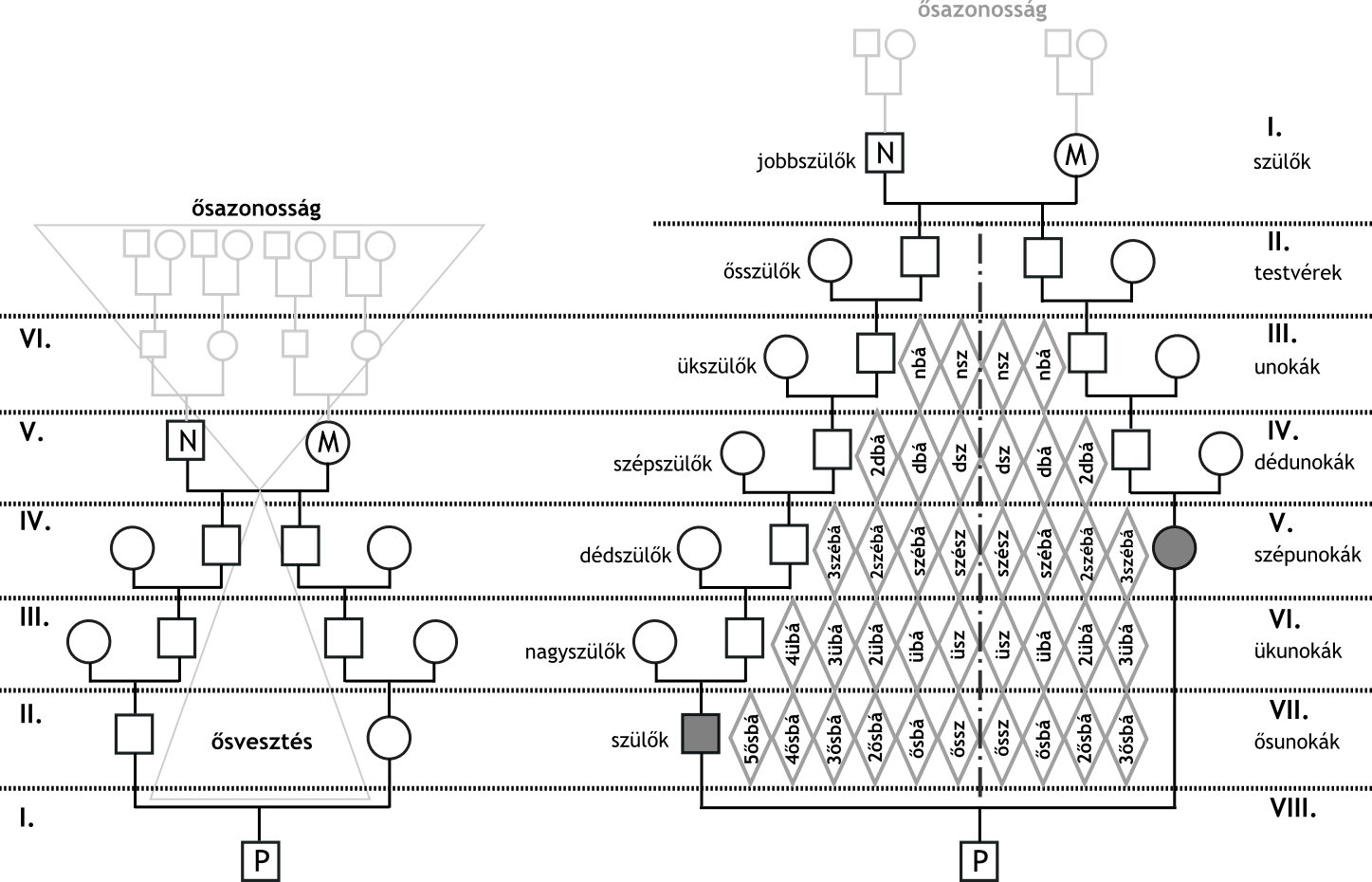 Ősvesztés és ősazonosság. Szegedi László, Általános genealógia. Budapest, 2015. 237. Pedigree collapse by László Szegedi, Általános genealógia. (Coprehensive genenalogy) Budapest, 2015. p. 237.